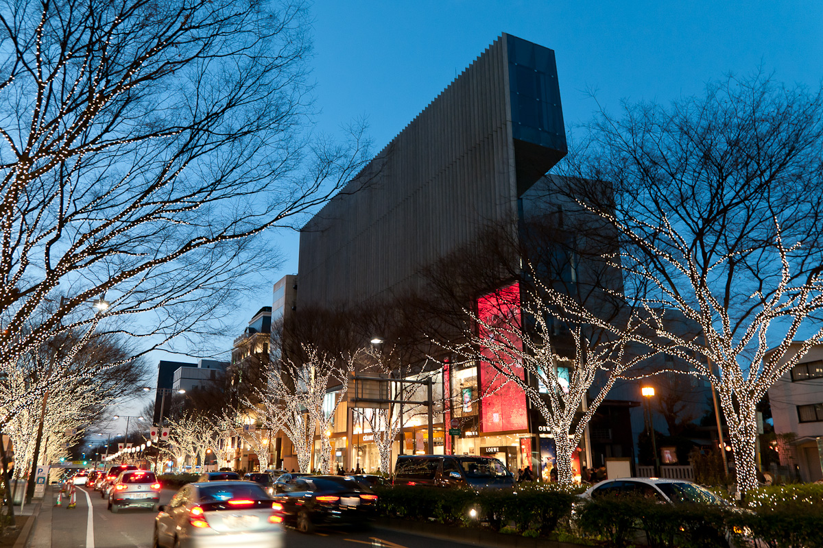 表参道のイルミネーション2010。東京都港区北青山。